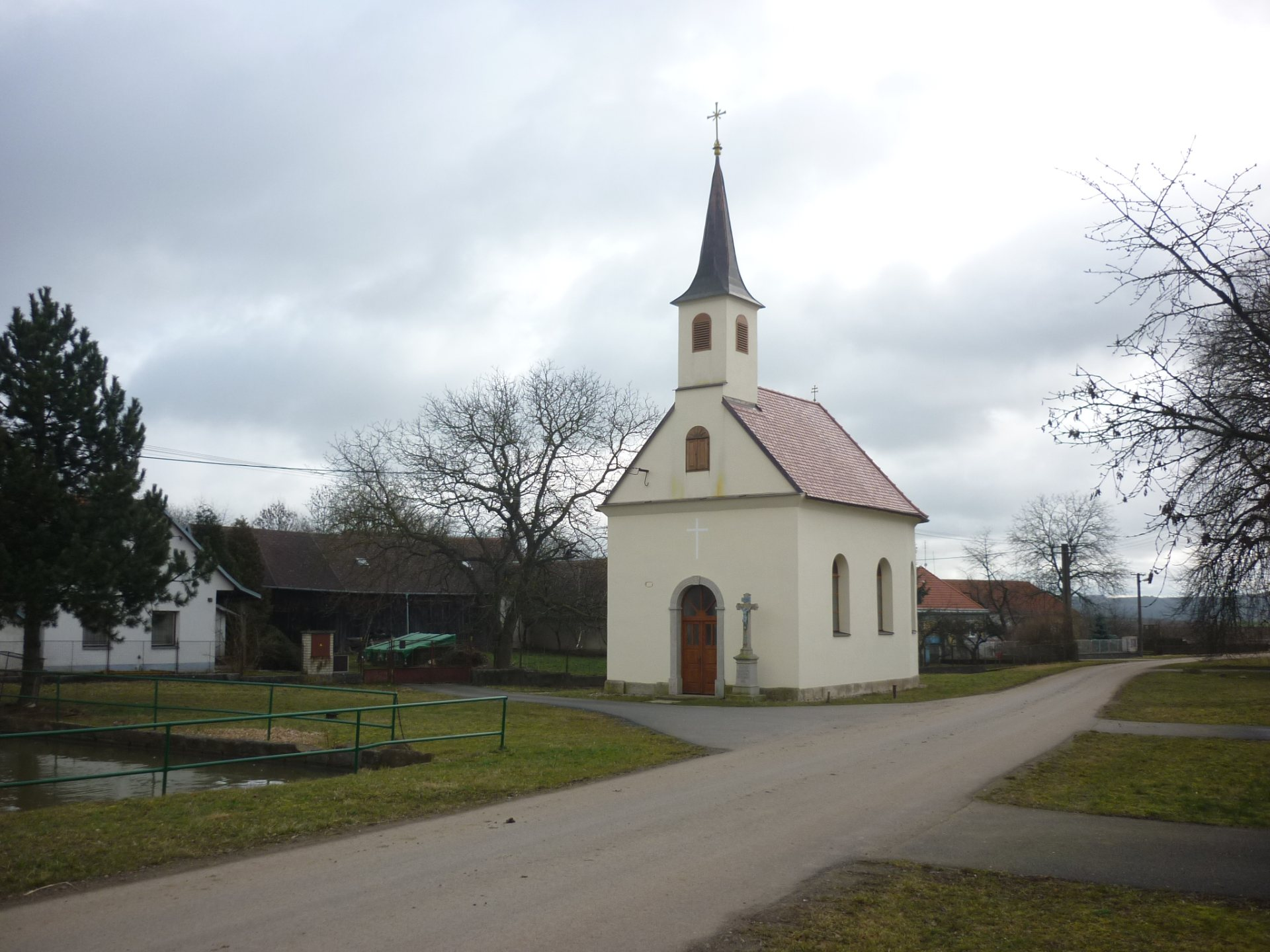 Manešovice pseudorenesanční kaple Nejsvětější Trojice z konce 19. století